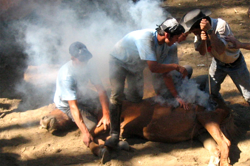 Rapa das bestas, Galiza